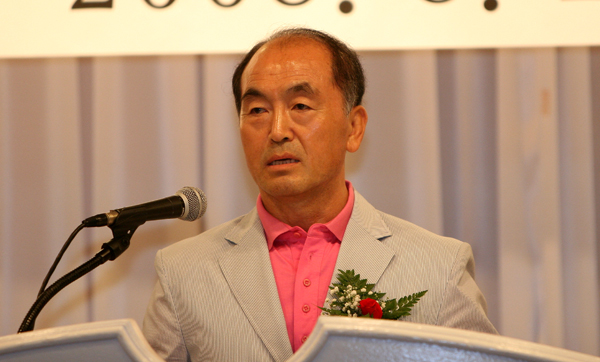 Declaration of consent(sent to ). 이 파일은 크리에이티브 커먼즈 저작자표시-동일조건변경허락 4.0 국제 라이선스로 배포됩니다. 단 누구인지 구별 가능한 특정 인물이 사진에 포함되어 있을 경우 사용 전에 소방방재신문 및 해당 인물의 승인을 받으셔야합니다. 감사합니다. 최광모.